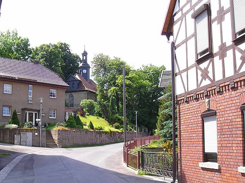 Welkershausen - Hauptstraße mit Dorfkirche